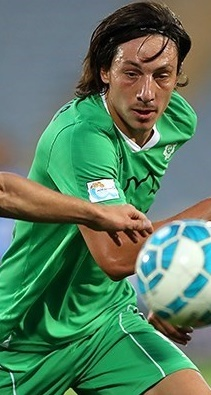 دیدار تیم های فوتبال استقلال تهران و ماشین سازی تبریز